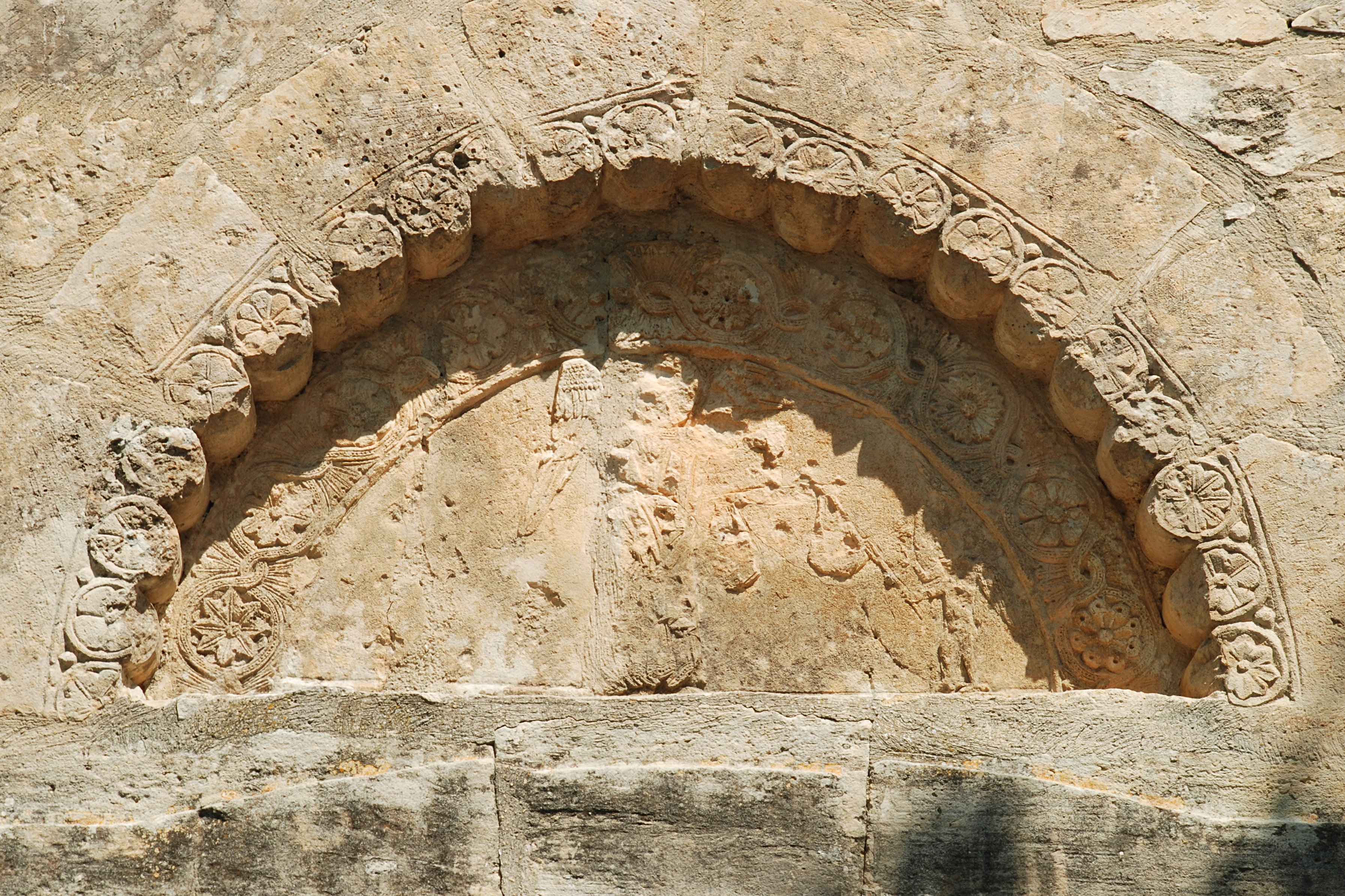 France - Hérault - Église Saint-Michel de Guzargues